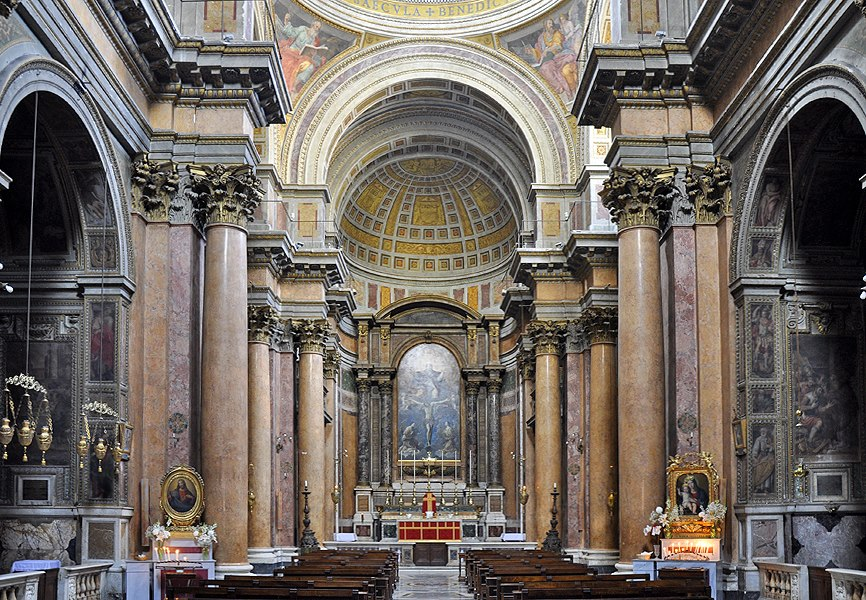 Innenraum der Kirche Santissima Trinita dei Pellegrini, Rom